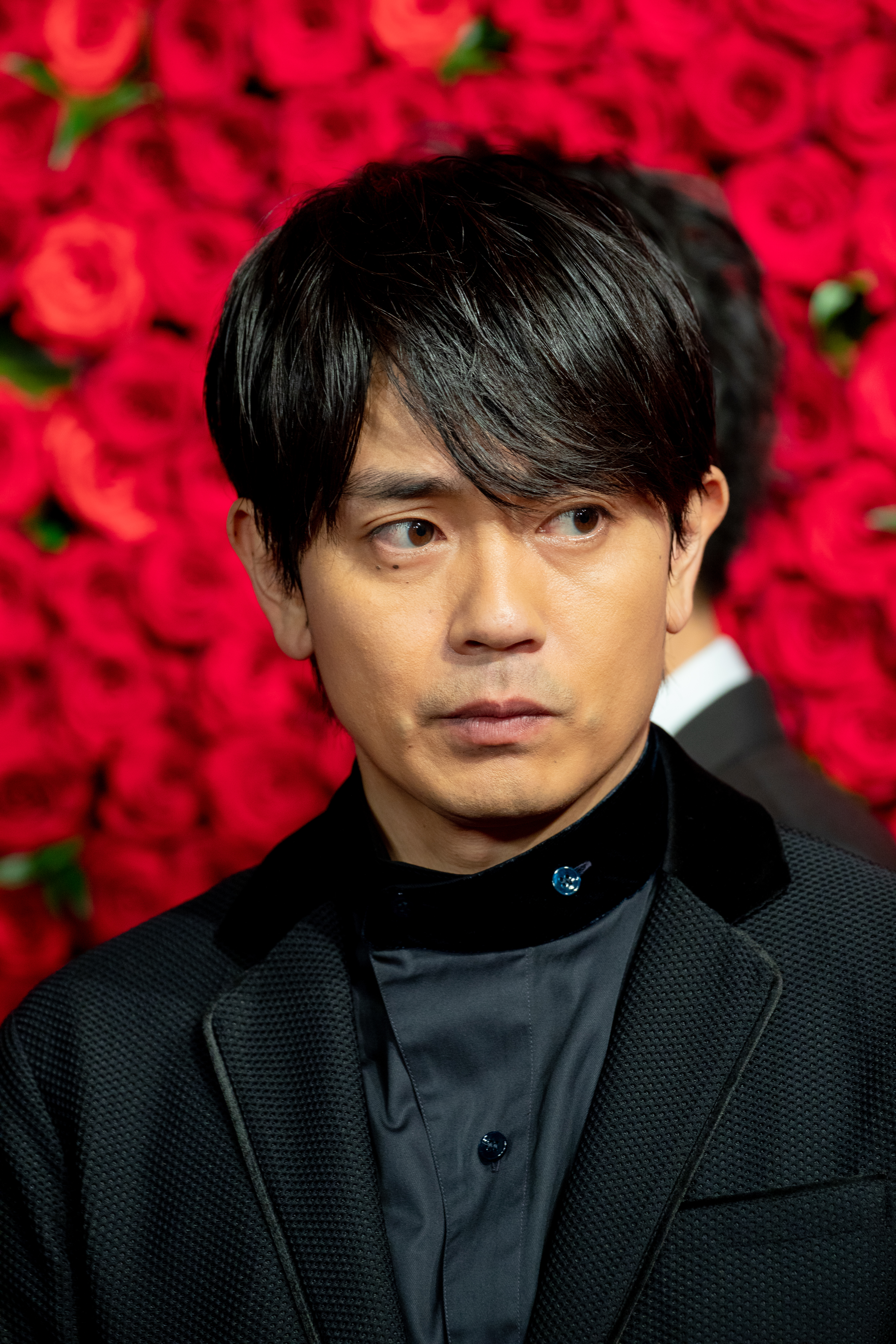 第30回 東京国際映画祭 オープニングセレモニー 青柳翔 (jam)